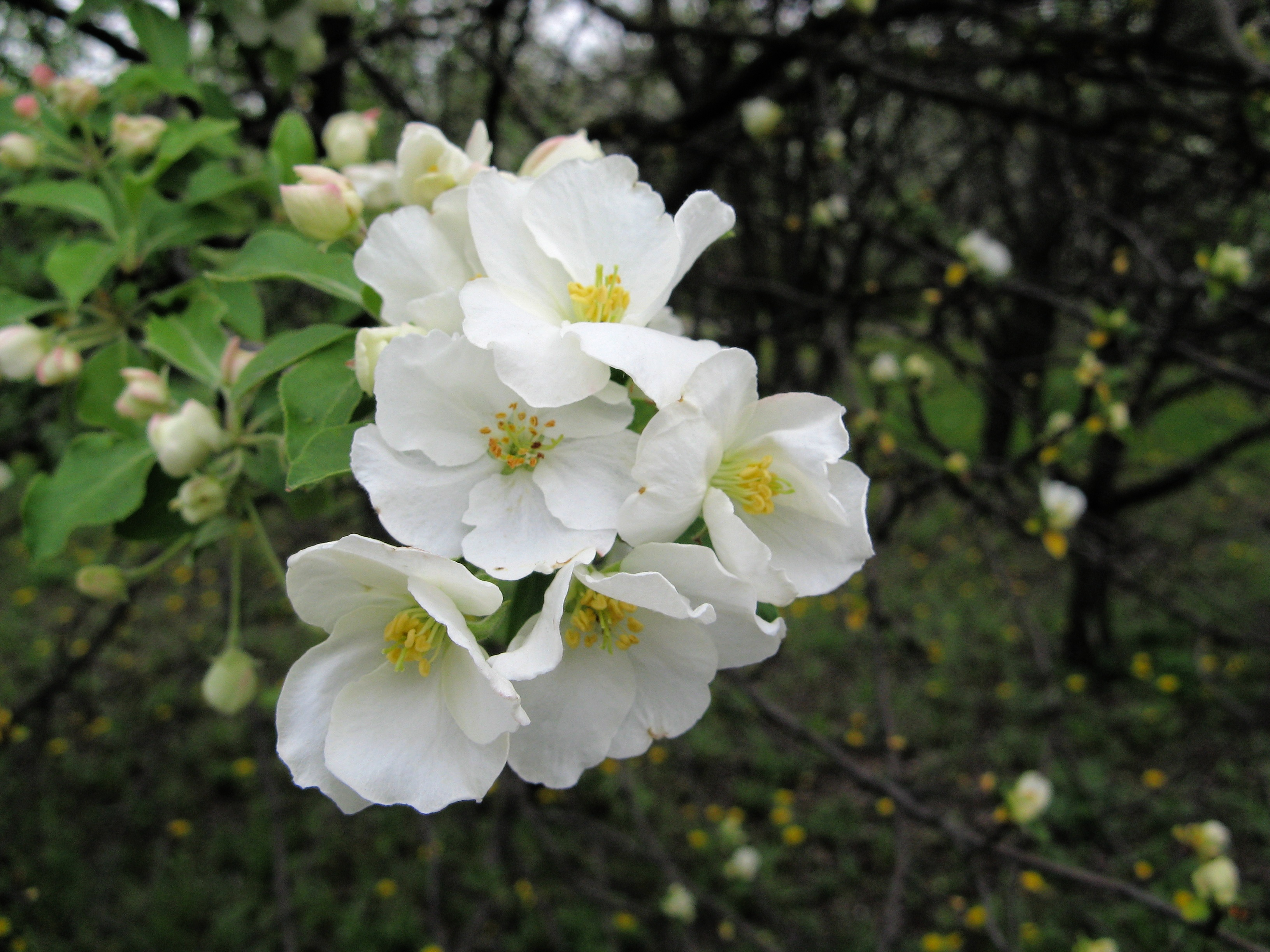 Криворізький ботанічний сад НАН України, м. Кривий Ріг, Тернівський район